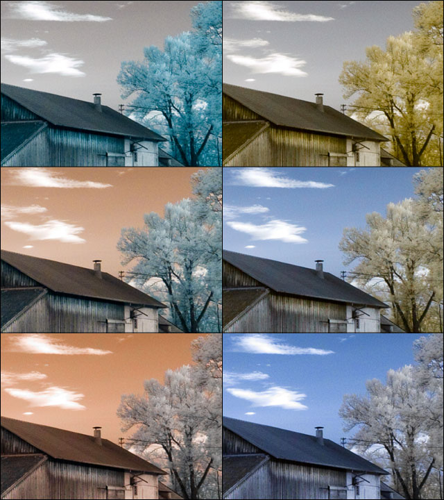 A fehéregyensúly, valamint a vörös és kék színcsatornák felcserélésének hatása infravörös fényképeknél. Függőleges irányban a fehéregyensúly változik, míg jobboldalt a képek csatornacserélt változata látható (helyszín: Unterhaching és Neubiberg között, Németország)